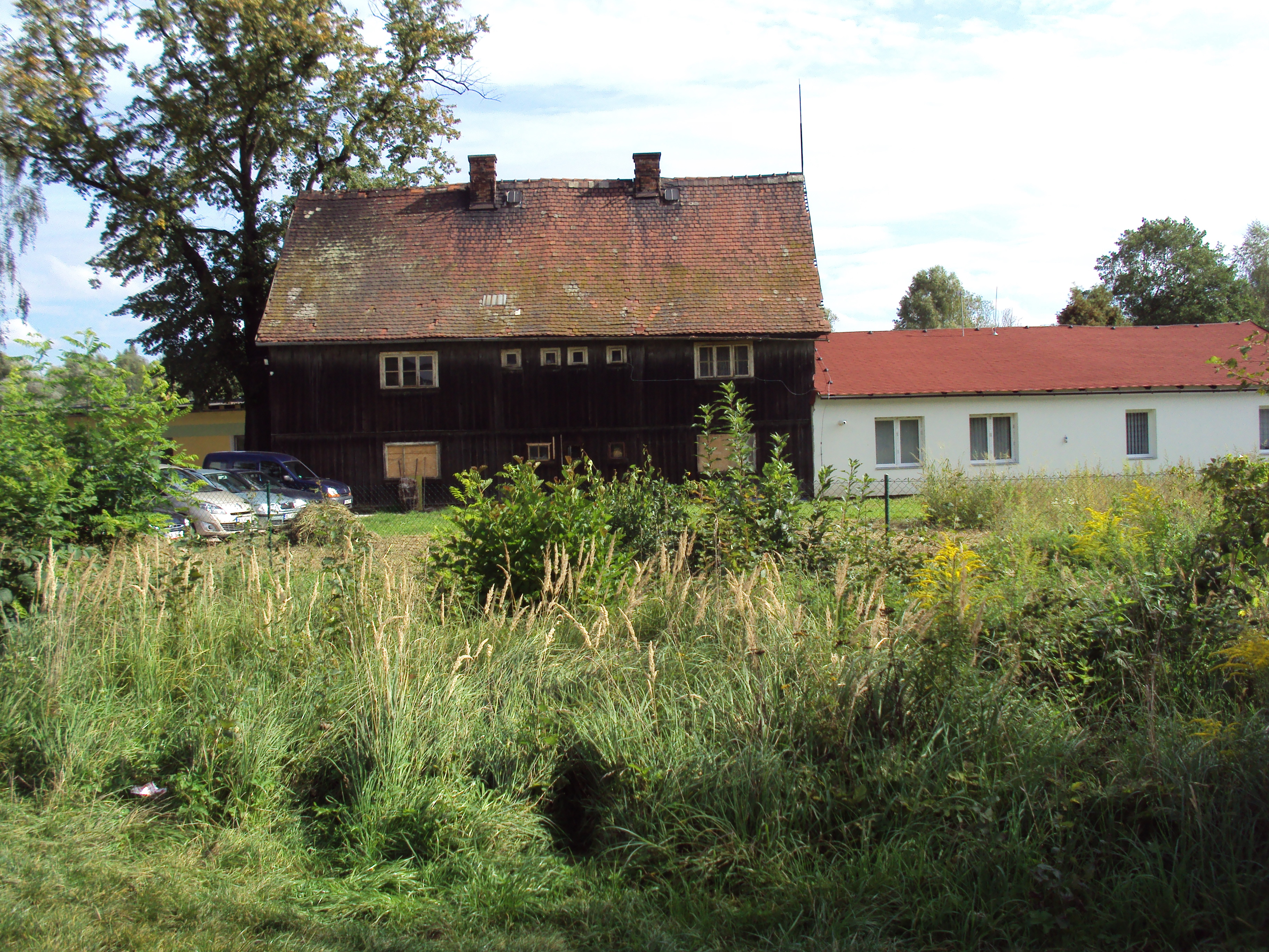 Zbytky staré zástavby čtvrti Robeč, dnes Dubice, Česká Lípa